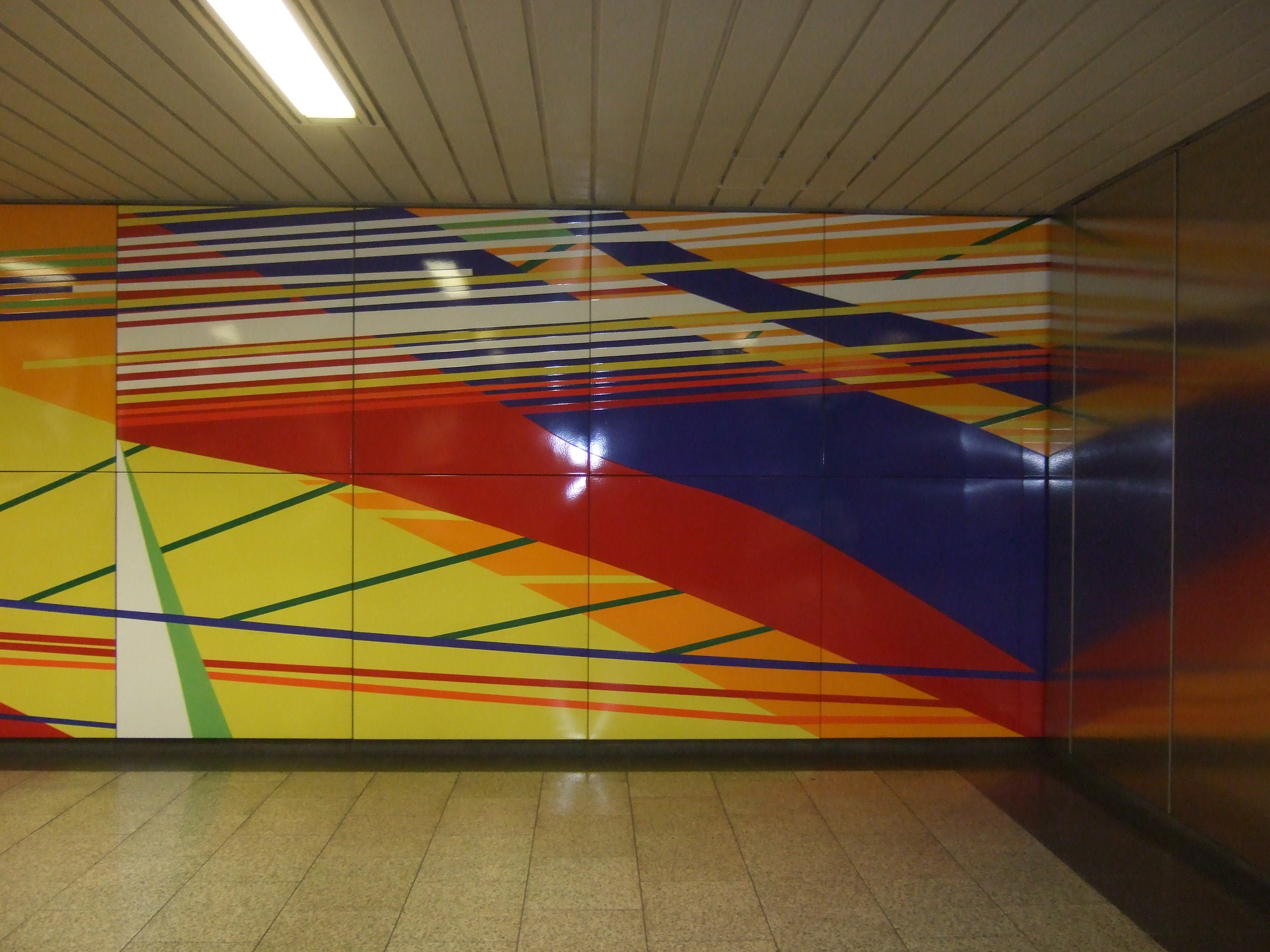 Duisburg-U-Bahn-Kunst von Gerhard Richter